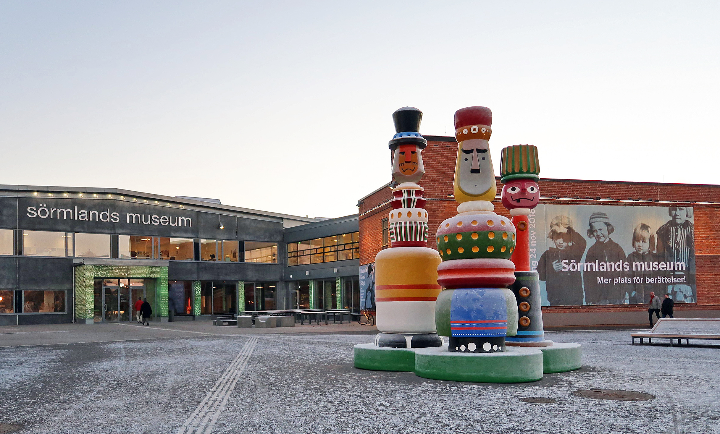 Entré till Sörmlands museum. I förgrunden en skulptur av konstnären Peter Johansson.